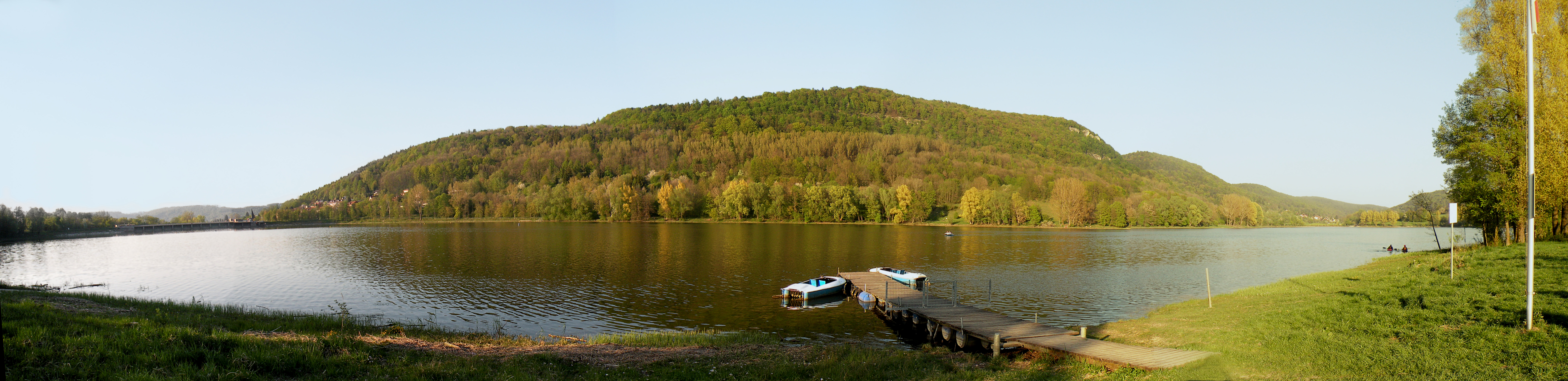 Houbirg_montain.Hersbrucker Schweiz